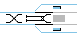 Схема путевого развития станции «Бульвар Дмитрия Донского» с платформами станции «Улица Старокачаловская»